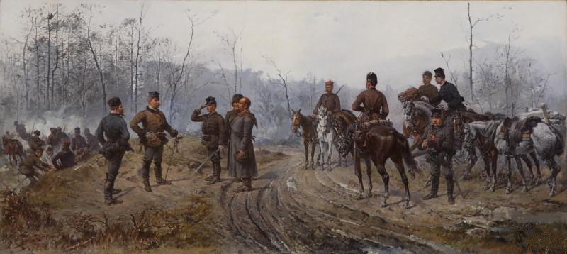 Scena z powstania styczniowego - Przesłuchanie jeńców